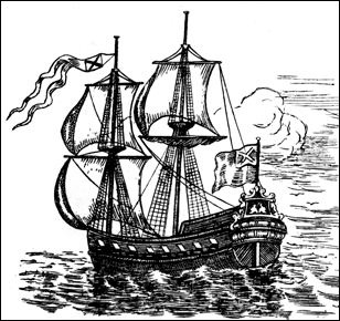 Питер Пикарт. Шнява «Мункер». Фрагмент офорта «Боевые порядки русского флота на пути к Выборгу в мае 1710 года», выполненного Пикартом в 1711 году